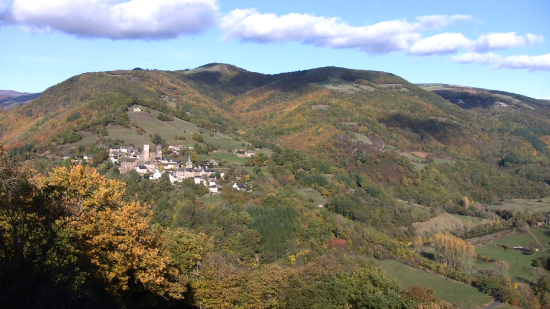 Commune de Pomayrols (Aveyron-France)